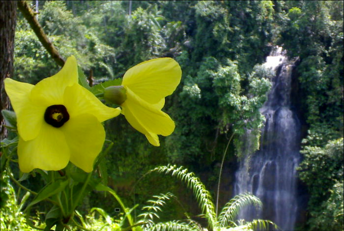 Cimandaway at Cikawalon river